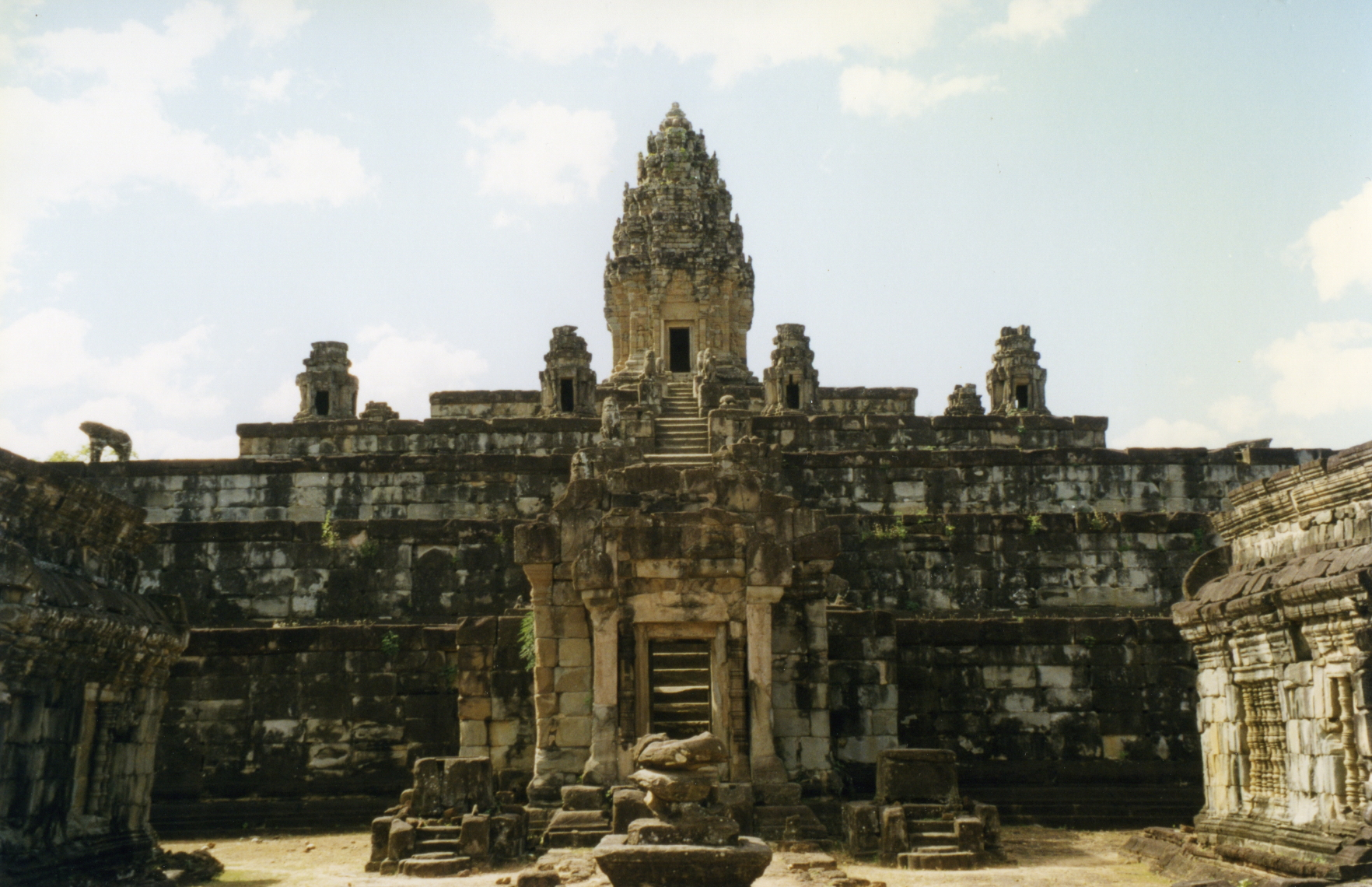 Roluos Group, Bakong